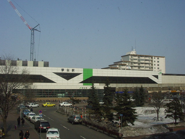 撮影位置: 北海道、札幌市、西区。イトーヨーカ堂琴似店の2階から。東向き。 撮影日: 2004年3月24日。 撮影者: Kinori（投稿者と同じ）。 画像形式: JPEG形式、640x480ピクセル、色数24bit。